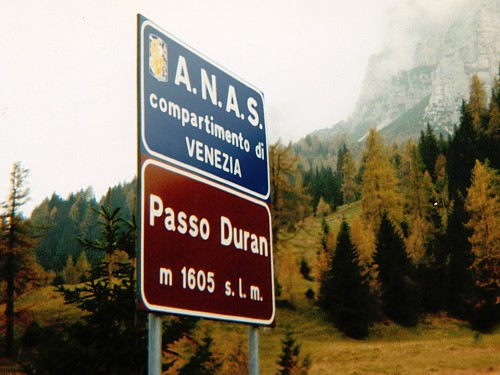 Duranpas